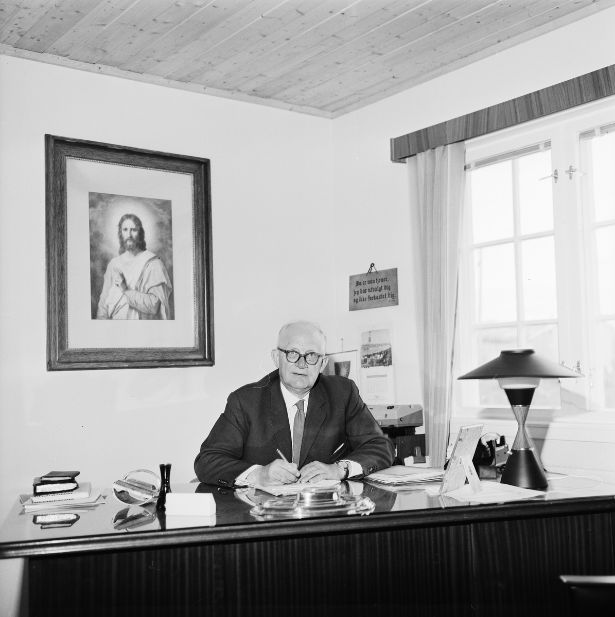 Hans Edvard Wisløff (1902–1969), biskop i Sør-Hålogaland bispedømme fra 1959 til 1969